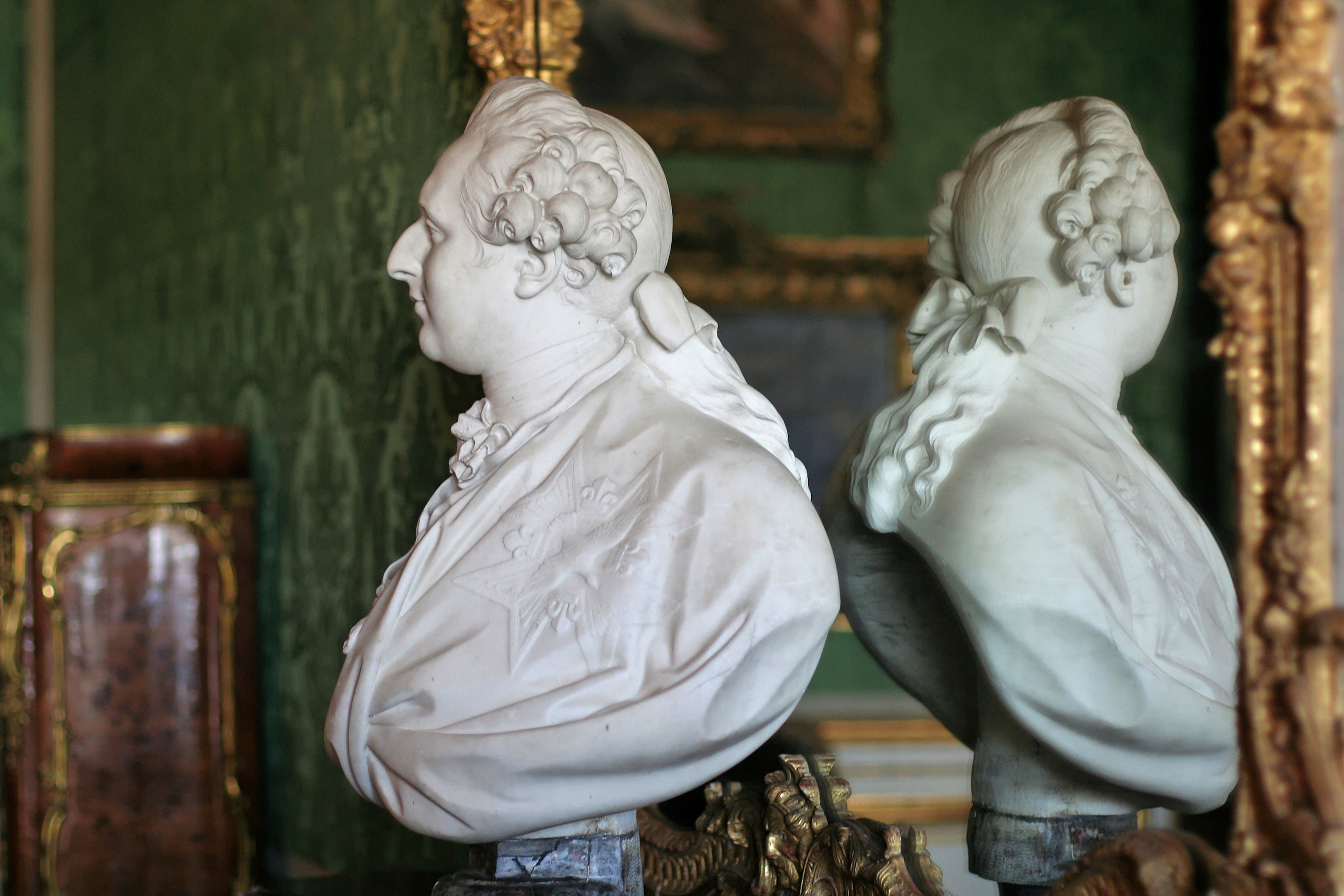 Bust on piedouche